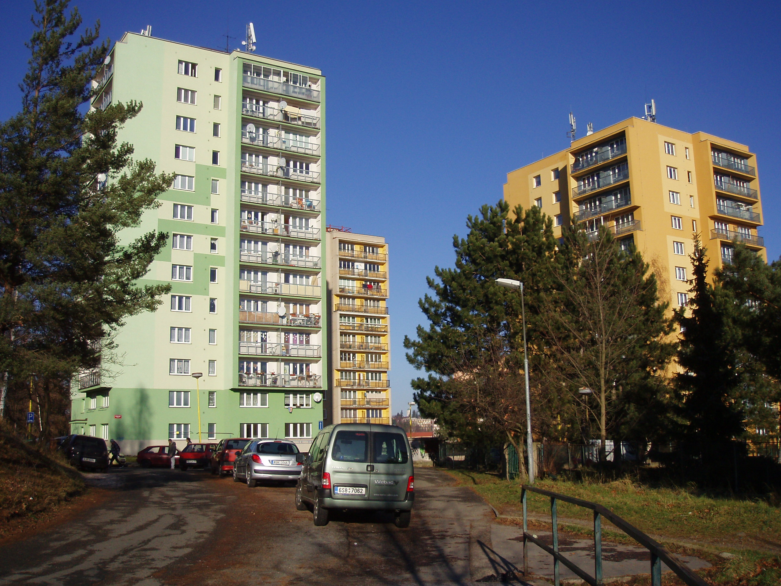 Věžáky na vrchu Čerťák